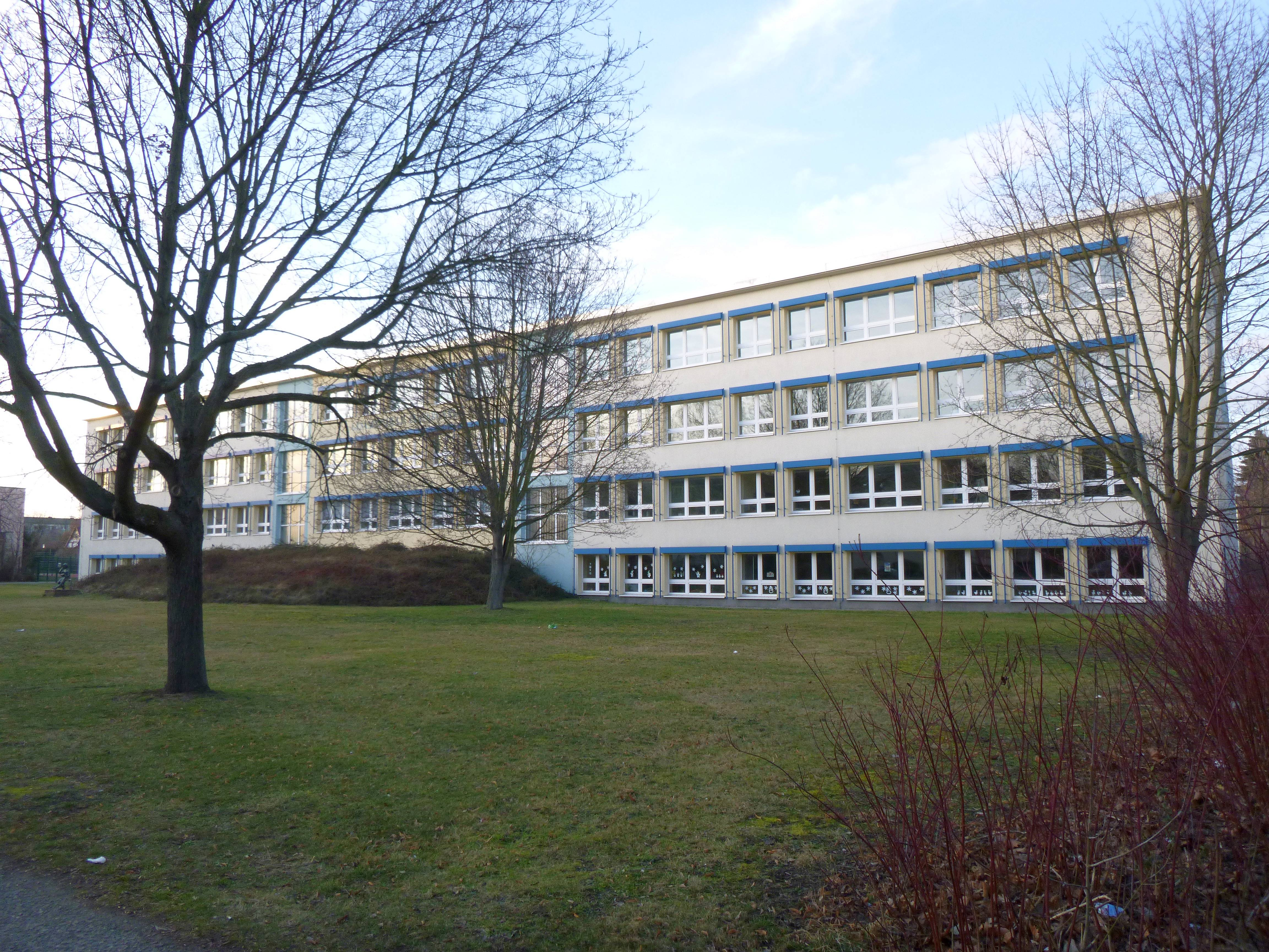 Oberschule im Elsterwerda Stadtteil Elsterwerda-West